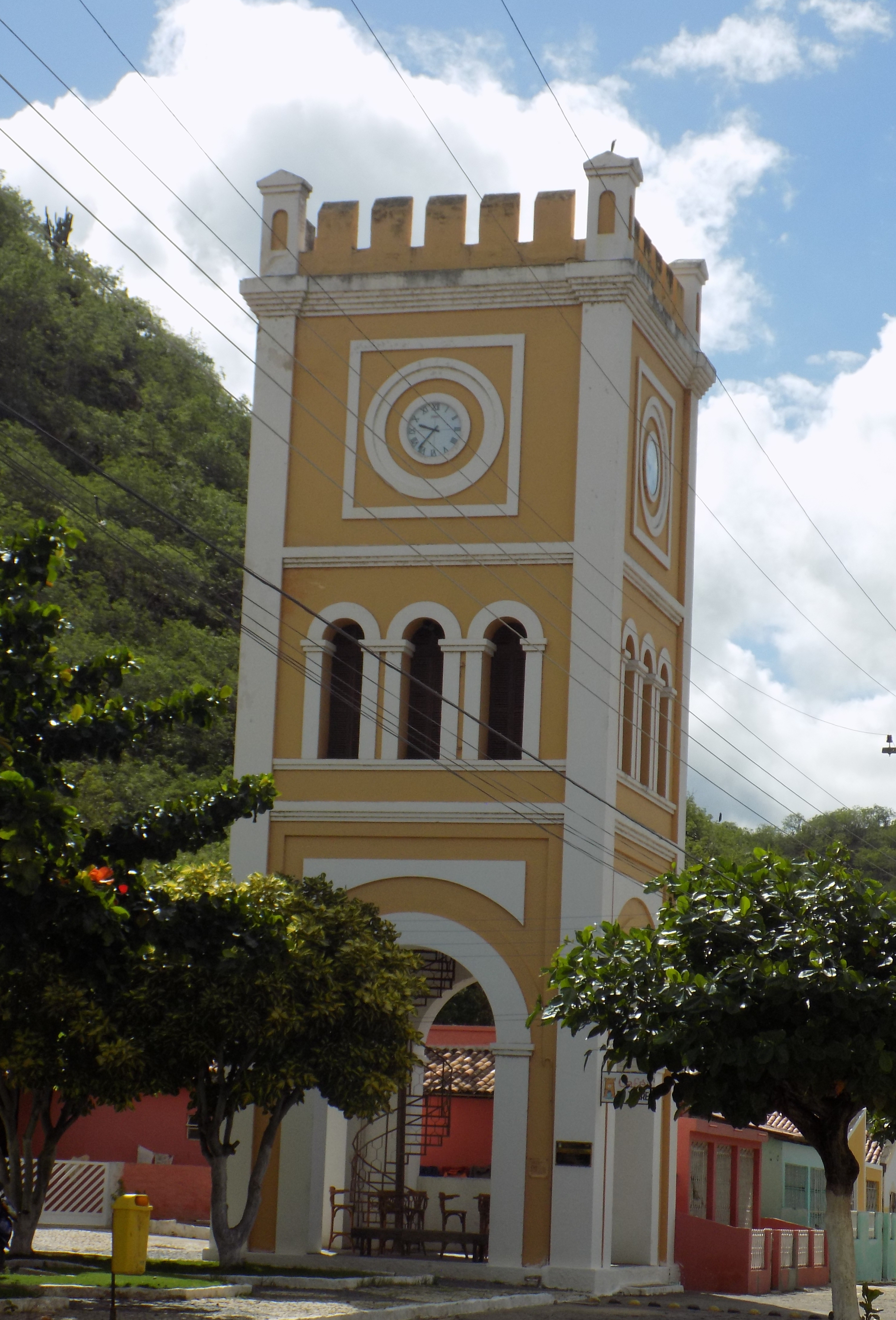 Piranhas, AL: Sítio histórico e Paisagístico